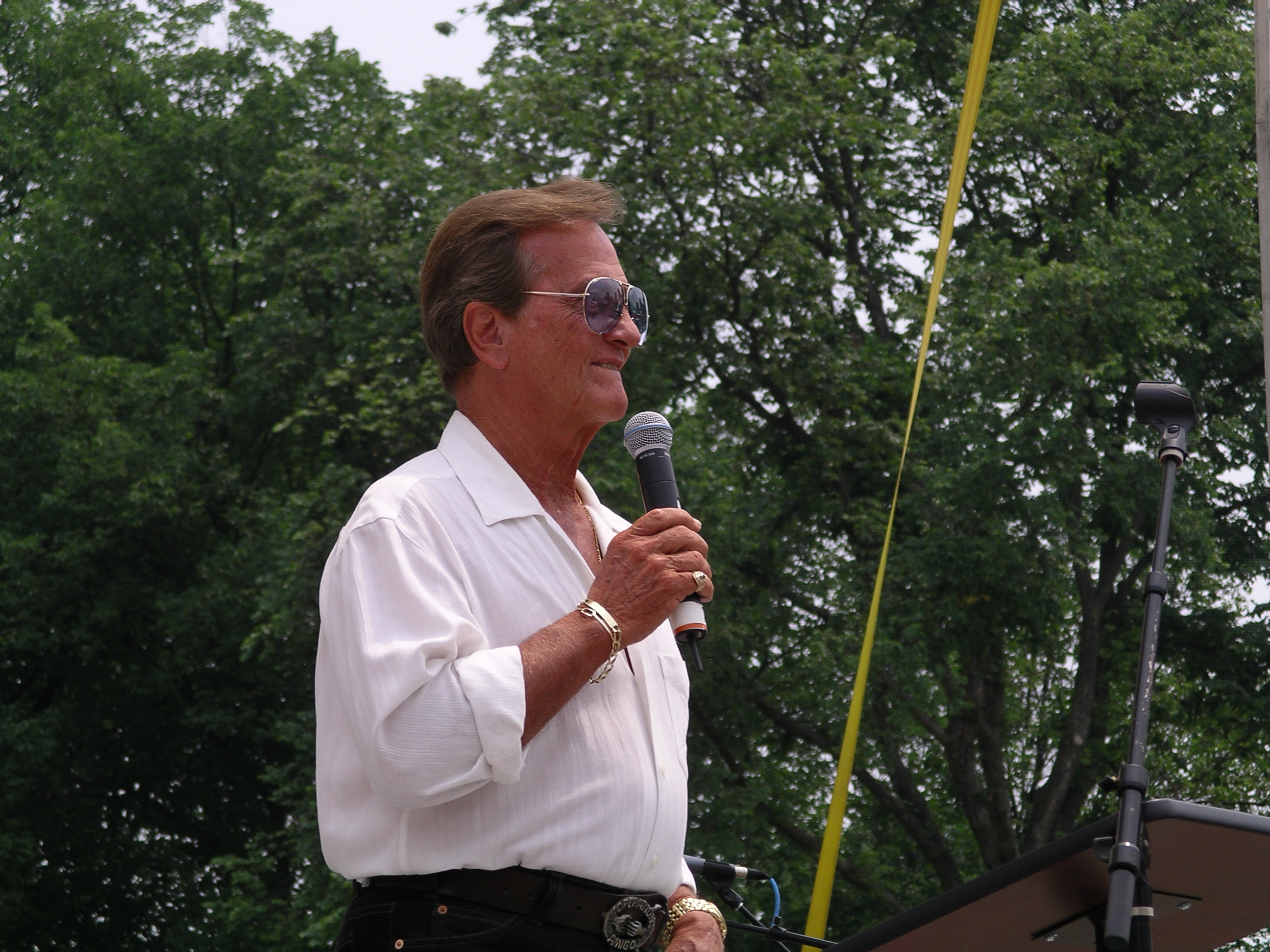 Pat BooneGOE II 5-27-07 071